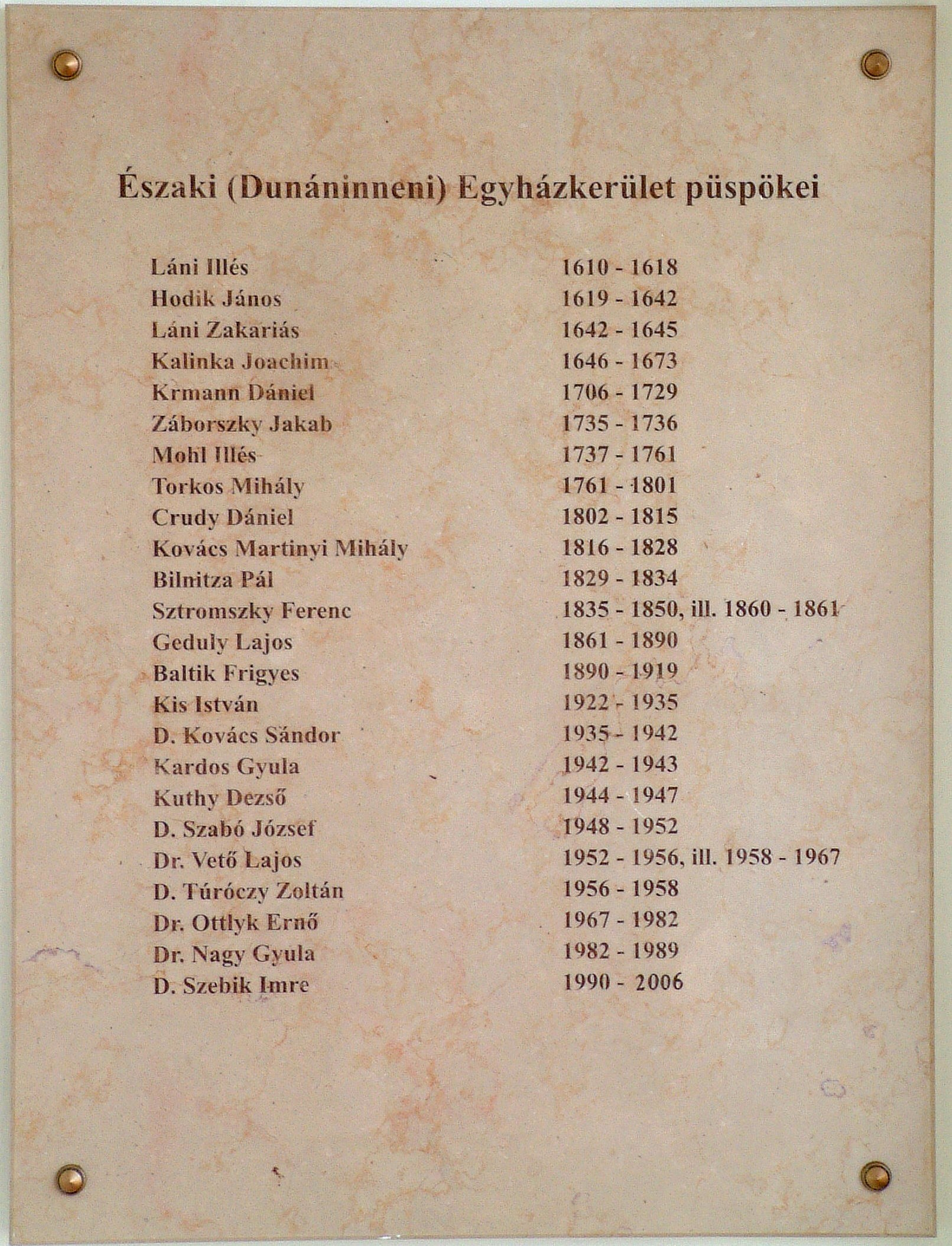 Püspökök idörendben